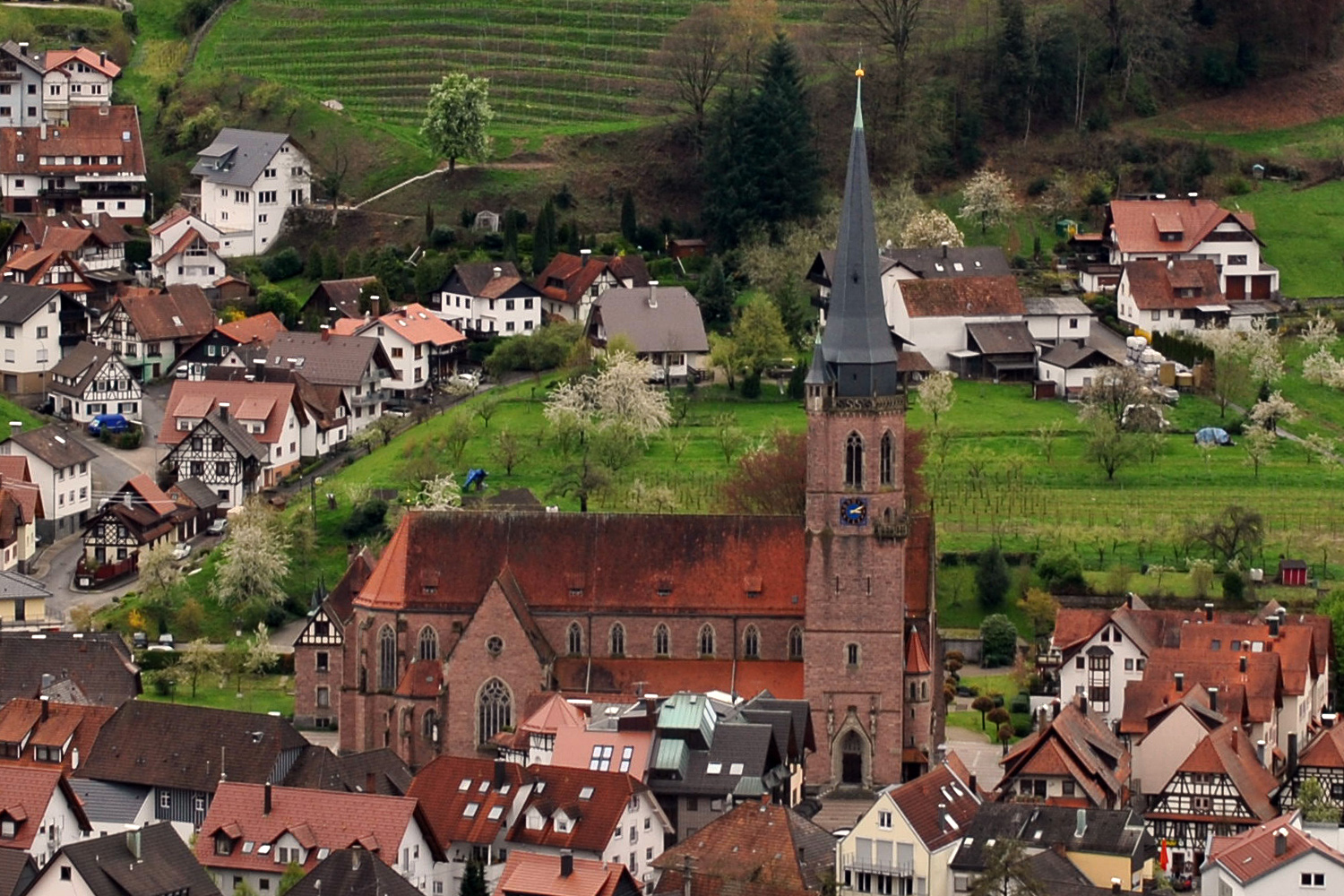 Die Kirche St. Nikolaus im idyllischen Luftkurort Kappelrodeck im Schwarzwald